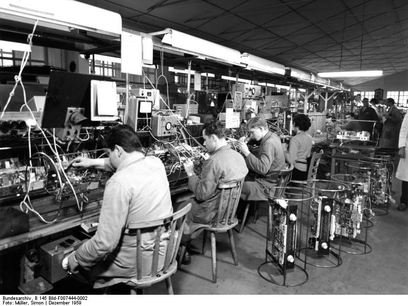 Nürnberg Grundig Radio-Werke Rundfunkgeräte, die bei der Fertigung kleine Fehler zeigen, werden sofort aussortiert und von geschulten Fachkräften überprüft und repariert.